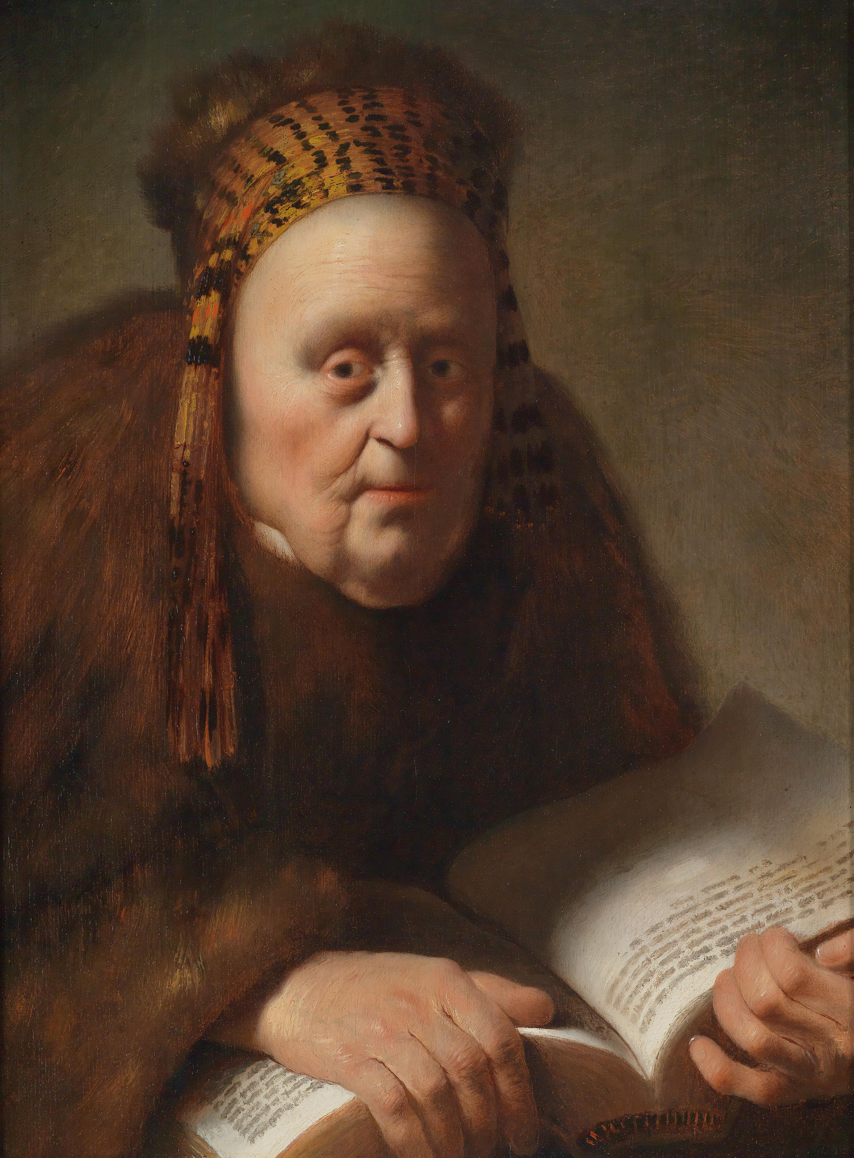 Alte Frau mit Buch, Öl auf Holz, 49,9 x 37,2 cm Provenienz: Sir Delves Broughton, Bart., Doddington Hall, Nantwich, Cheshire Schaeffer Galleries, New York; deren Auktion, Parke-Bernet, New York, 26. Mai 1943, Lot 84, verkauft an die Grafton Galleries Captain Harold Paikin, New York dessen Nachlassauktion, Parke-Bernet, New York, 23. Januar 1952, Lot 66, * verkauft an Fred Maloof, Oxon Hill Manor, Maryland dessen Nachlassauktion, Silver Spring, Maryland, American Estate Auctions, 24., 25. und 26. September 1965, Lot 1147 (alle bisher genannten als Gerrit Dou) amerikanischer Sammler und seither innerhalb dessen Familie durch Erbschaft weitergegeben bis 2006